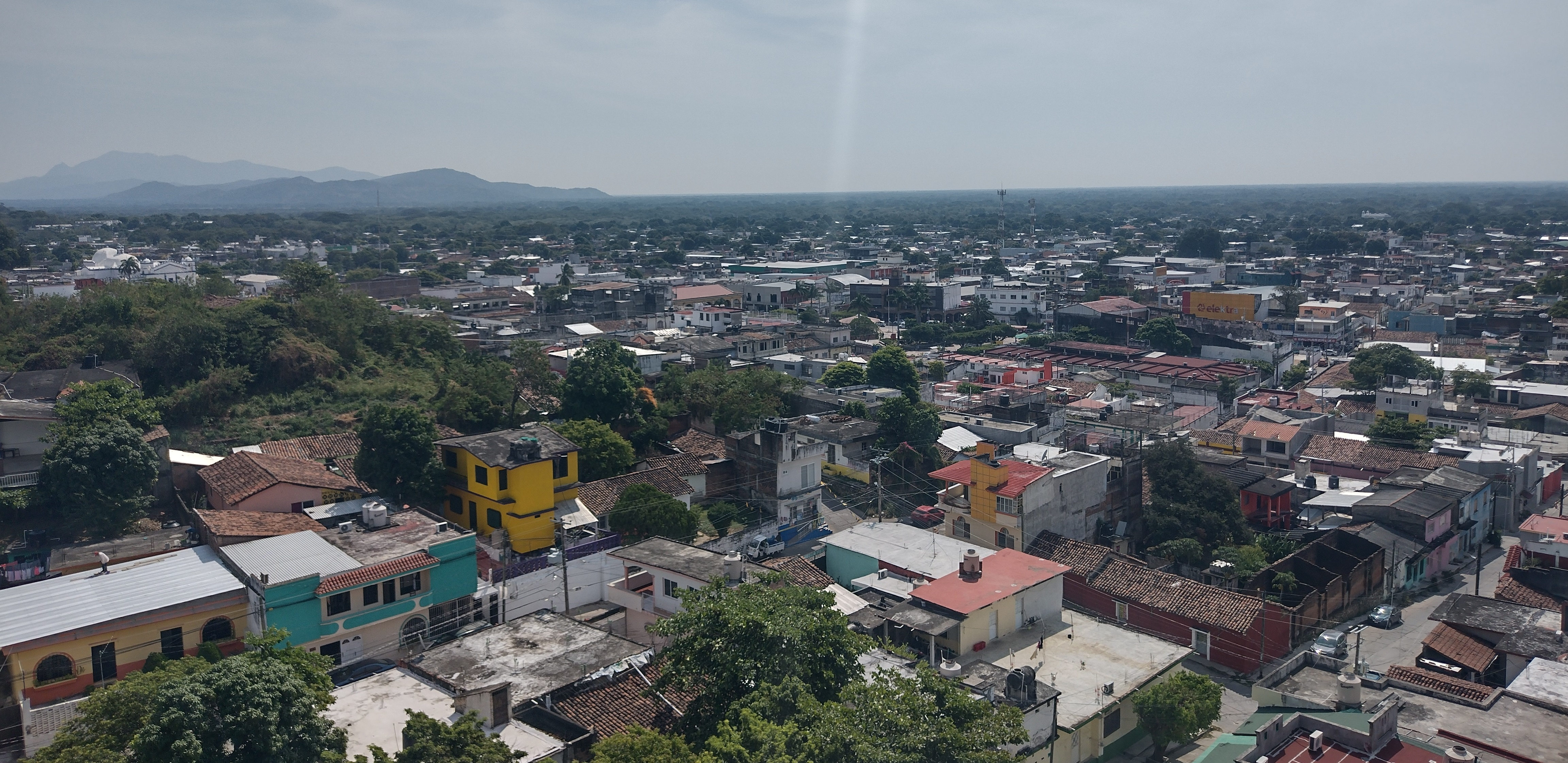 Panorámica de la ciudad de Tonalá desde la Loma de la Crucesita.